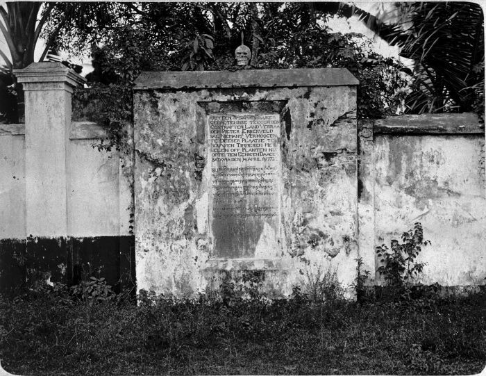 Foto. Gedenkteken voor de verrader Piter Erberfelt aan de Jacatraweg te Batavia.